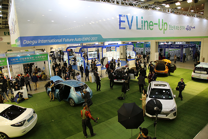 2017년 대구국제미래자동차엑스포